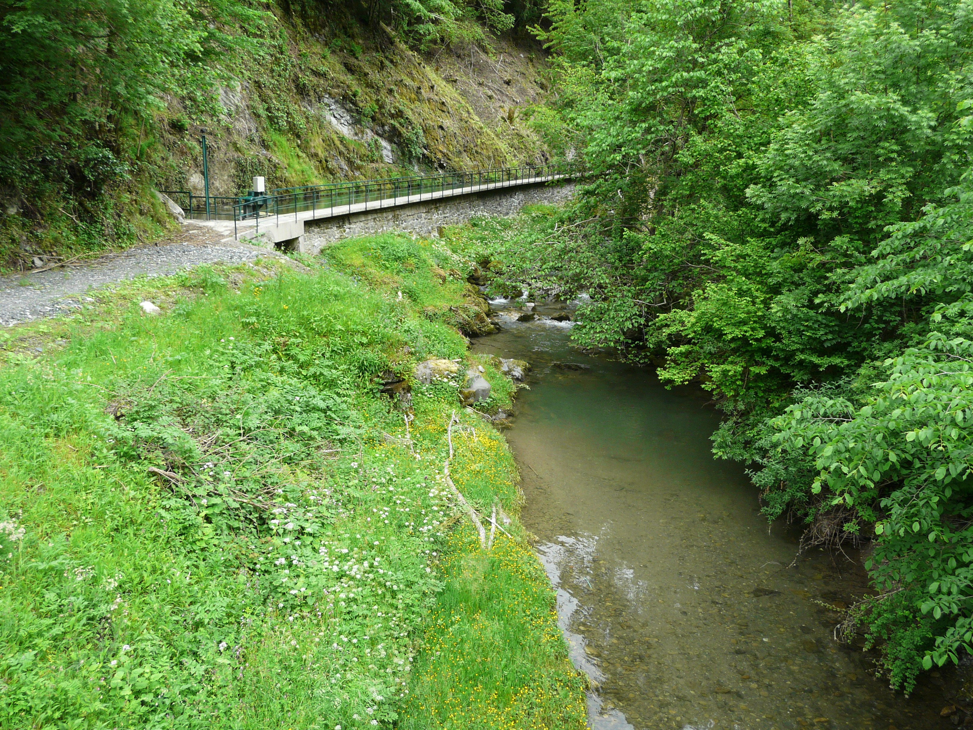 En amont du pont de Miey, l'One marque la limite entre Saint-Aventin (à gauche) et Trébons-de-Luchon (à droite), Haute-Garonne, France. Sur la gauche, prise d'eau pour l'usine hydroélectrique de Foirat à Bagnères-de-Luchon.